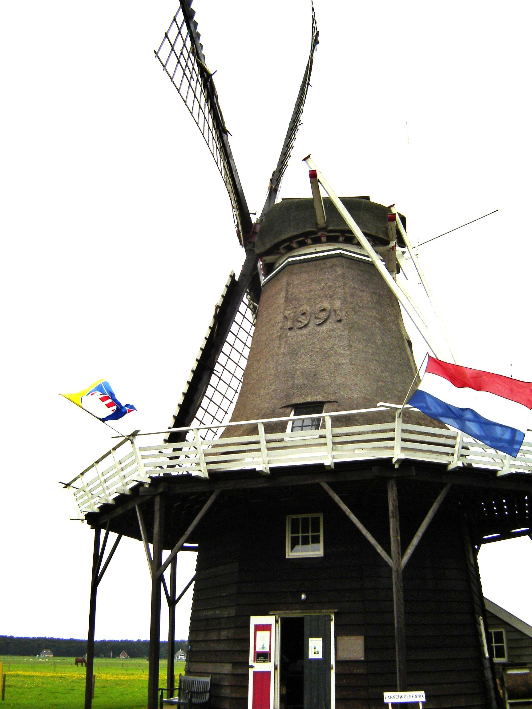 Mosterd- en Korenmolen "de Verwachting" (NesHollum Ameland)